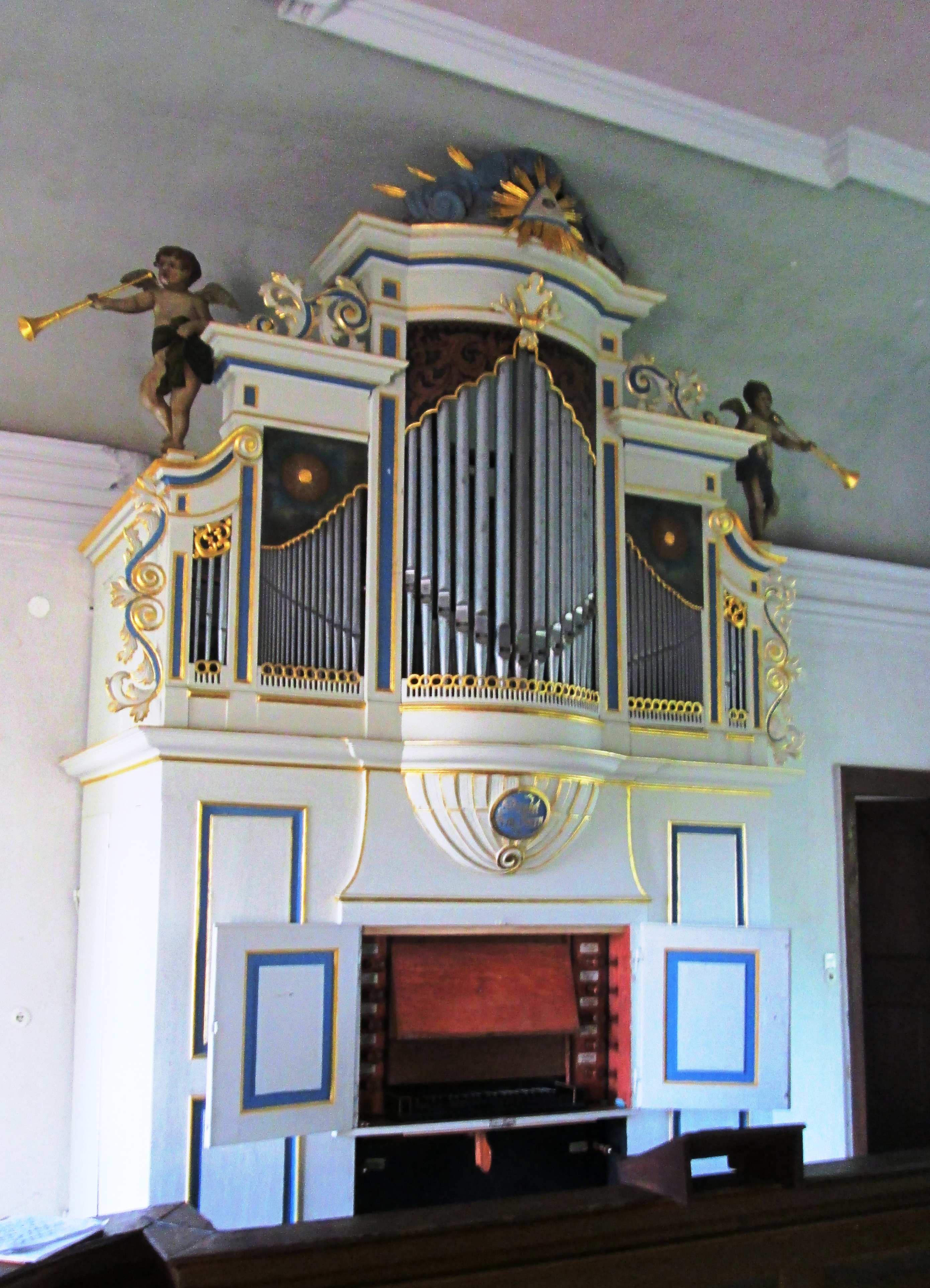 Turley-Orgel in der Dorfkircher Päwesin